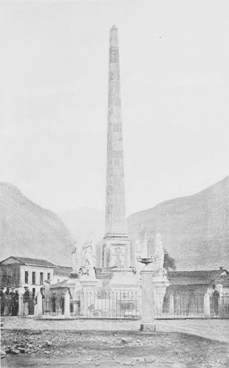 Monument aux martyrs de l'indépendance, Bogota